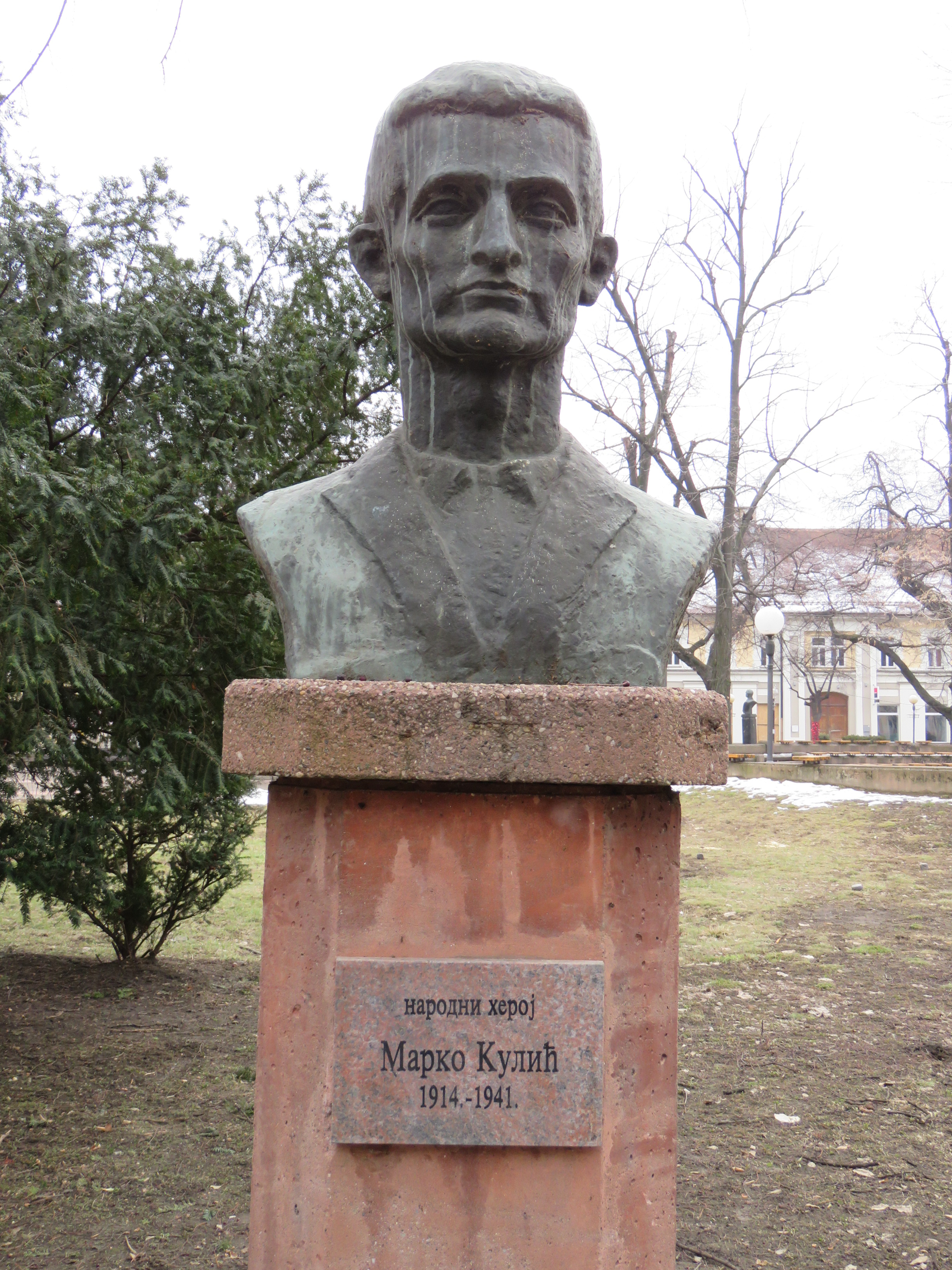 Marko Kulić, Narodni heroj SFRJ. Bista u Pančevu.